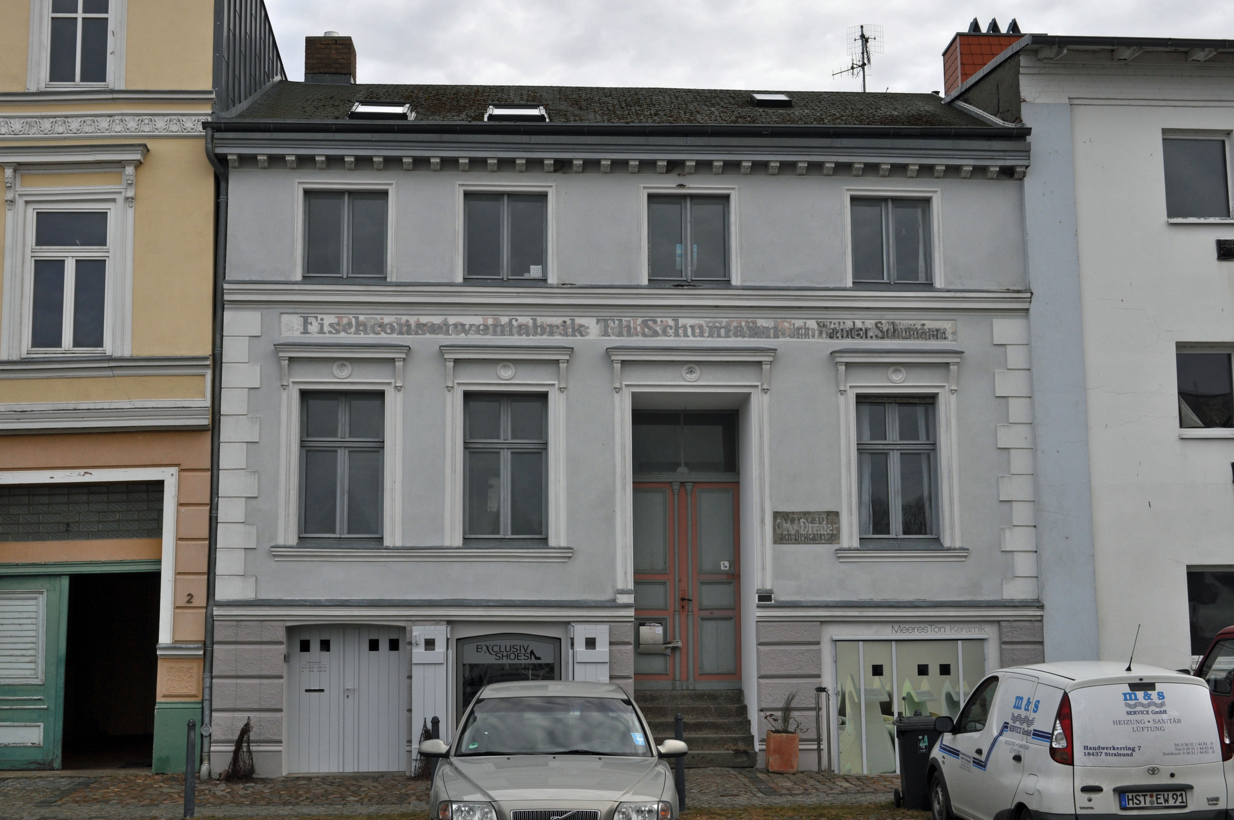 Gebäude bzw. Gebäudedetail in Stralsund. Straße und Hausnummer siehe Dateiname.